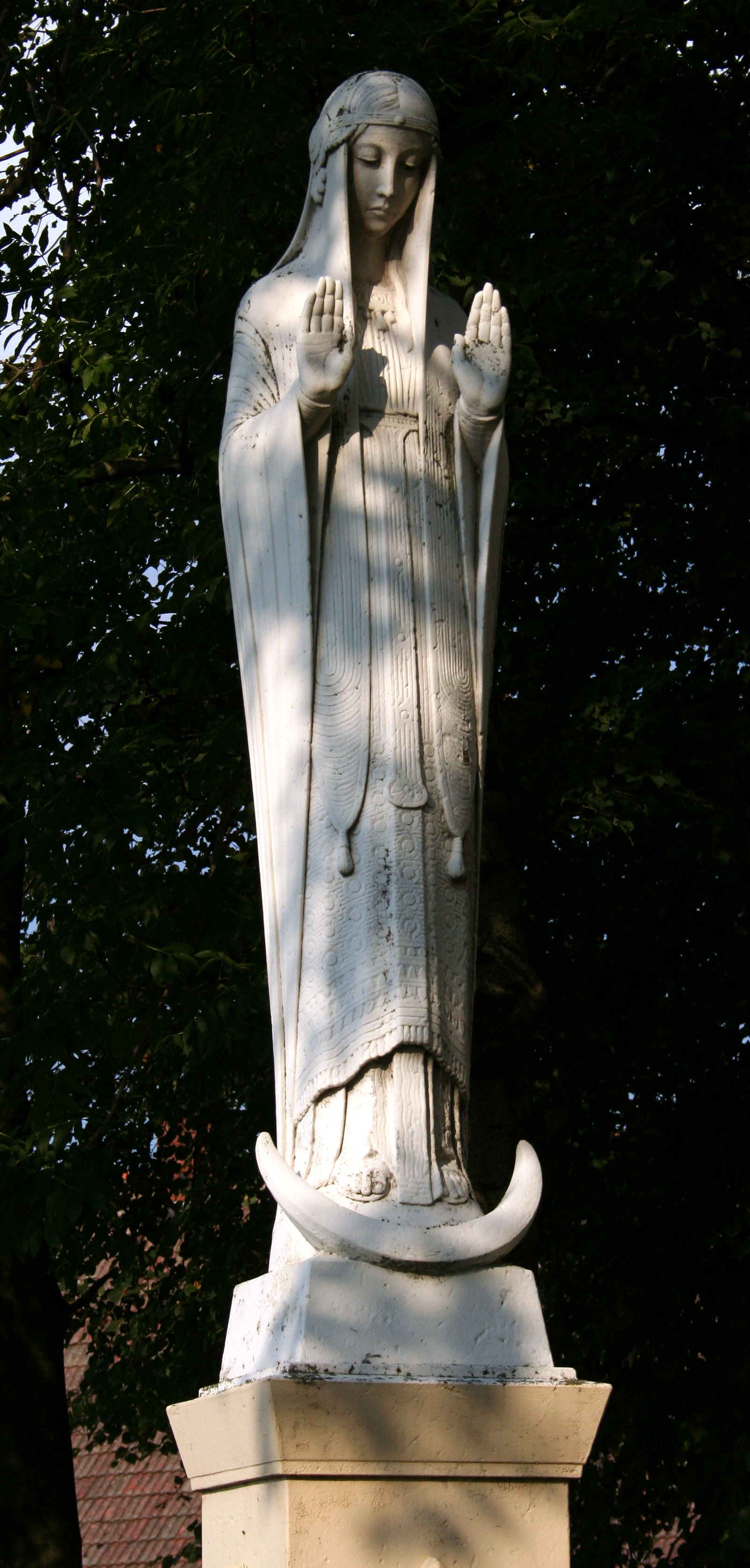 figura Matki Boskiej Nieustającej Pomocy przy kościele św. Jakuba Starszego Apostoła w Lubszy, gmina Woźniki, powiat lubliniecki